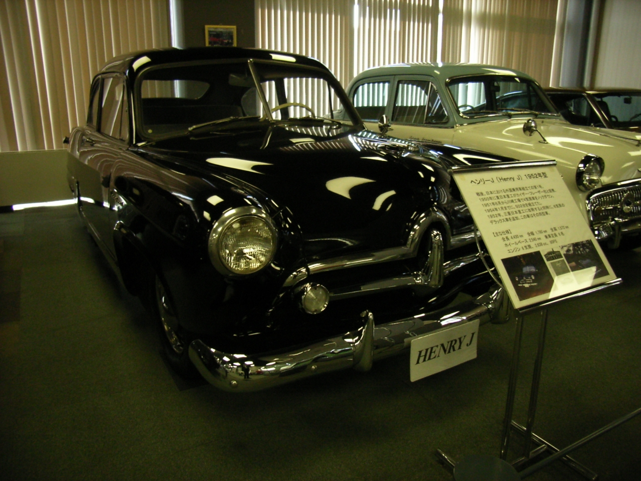 ヘンリーＪ/三菱オートギャラリー 投稿者 2006.3.21撮影